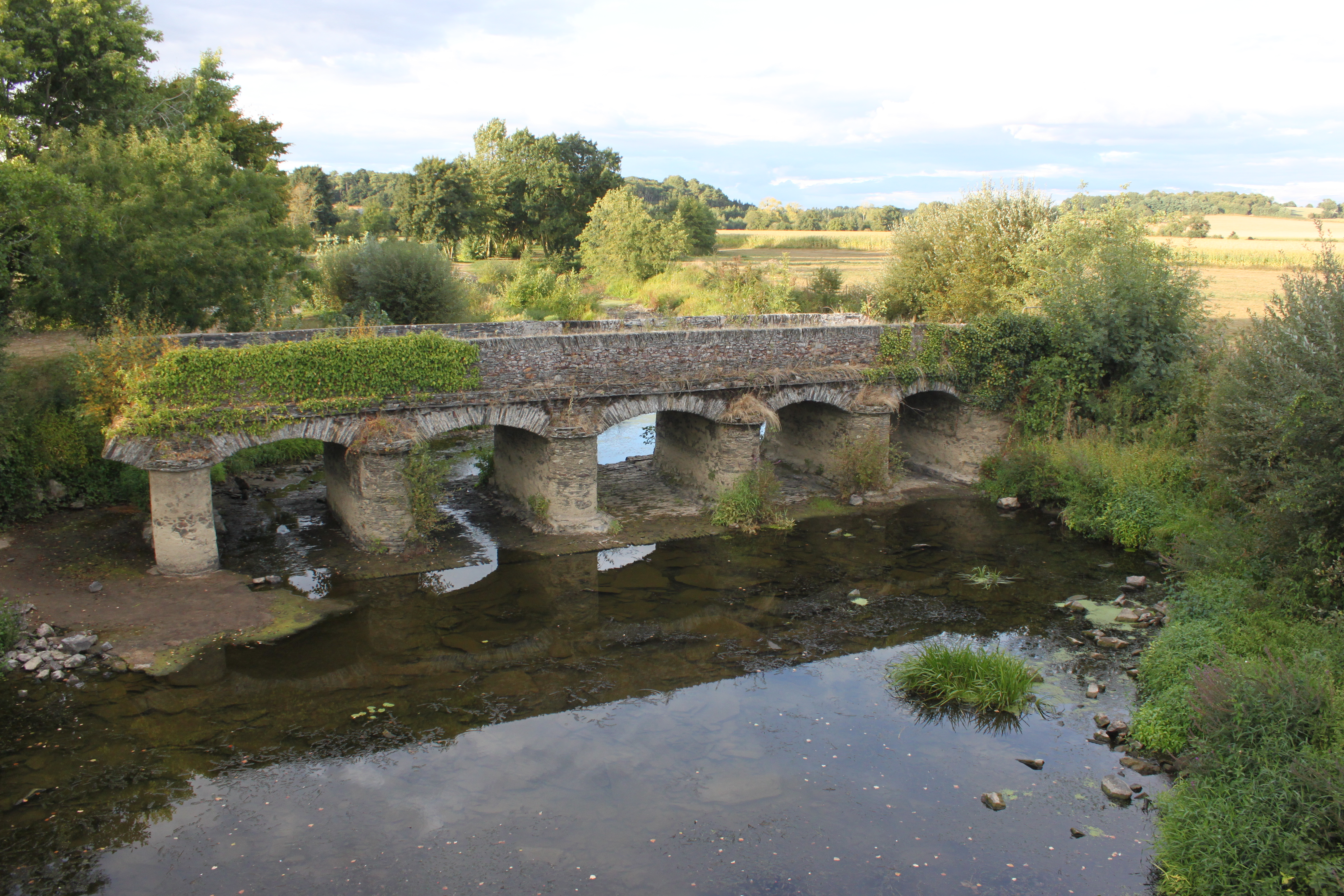 Vieux pont sur l'Oudon, Fr-49-Nyoiseau.